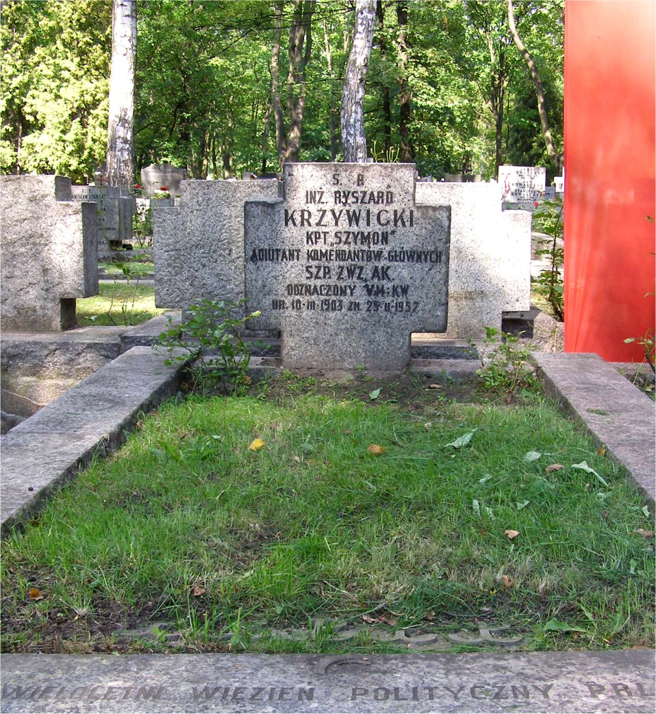 Grób Ryszarda Krzywickiego na Powązkach Wojskowych w Warszawie (fot Zu)